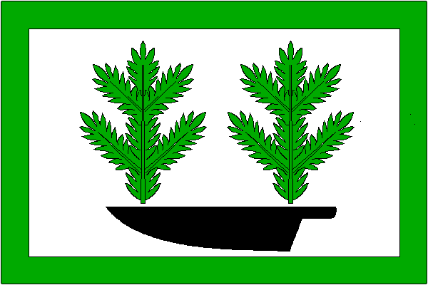 vlajka, Radíkov, okres Přerov